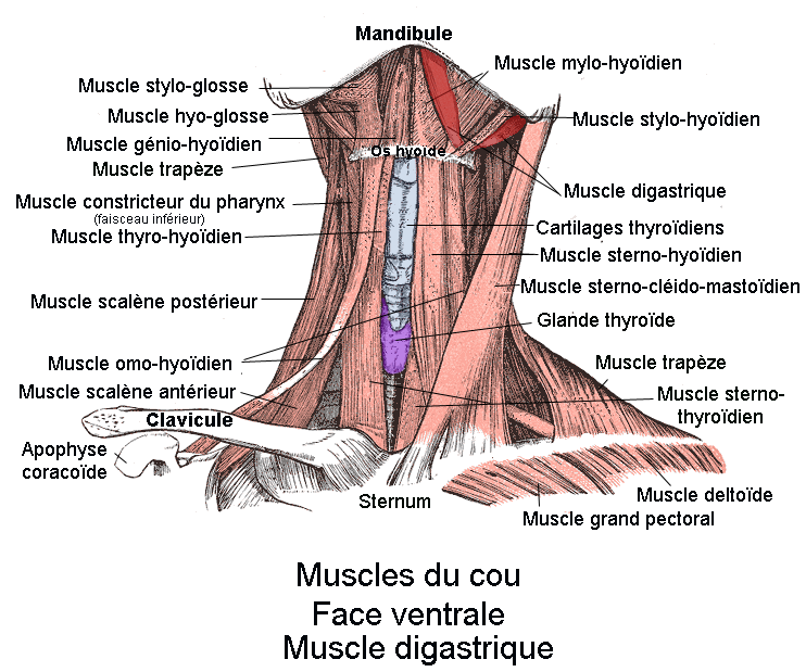 Muscle digastrique. Vue antérieure.Anatomie humaine